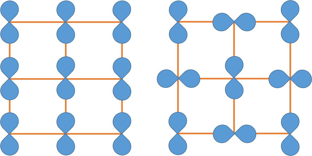 Zwei Beispiele für Orbitalordnung mit gleichförmiger und alternierender Besetzung von Orbitalen.